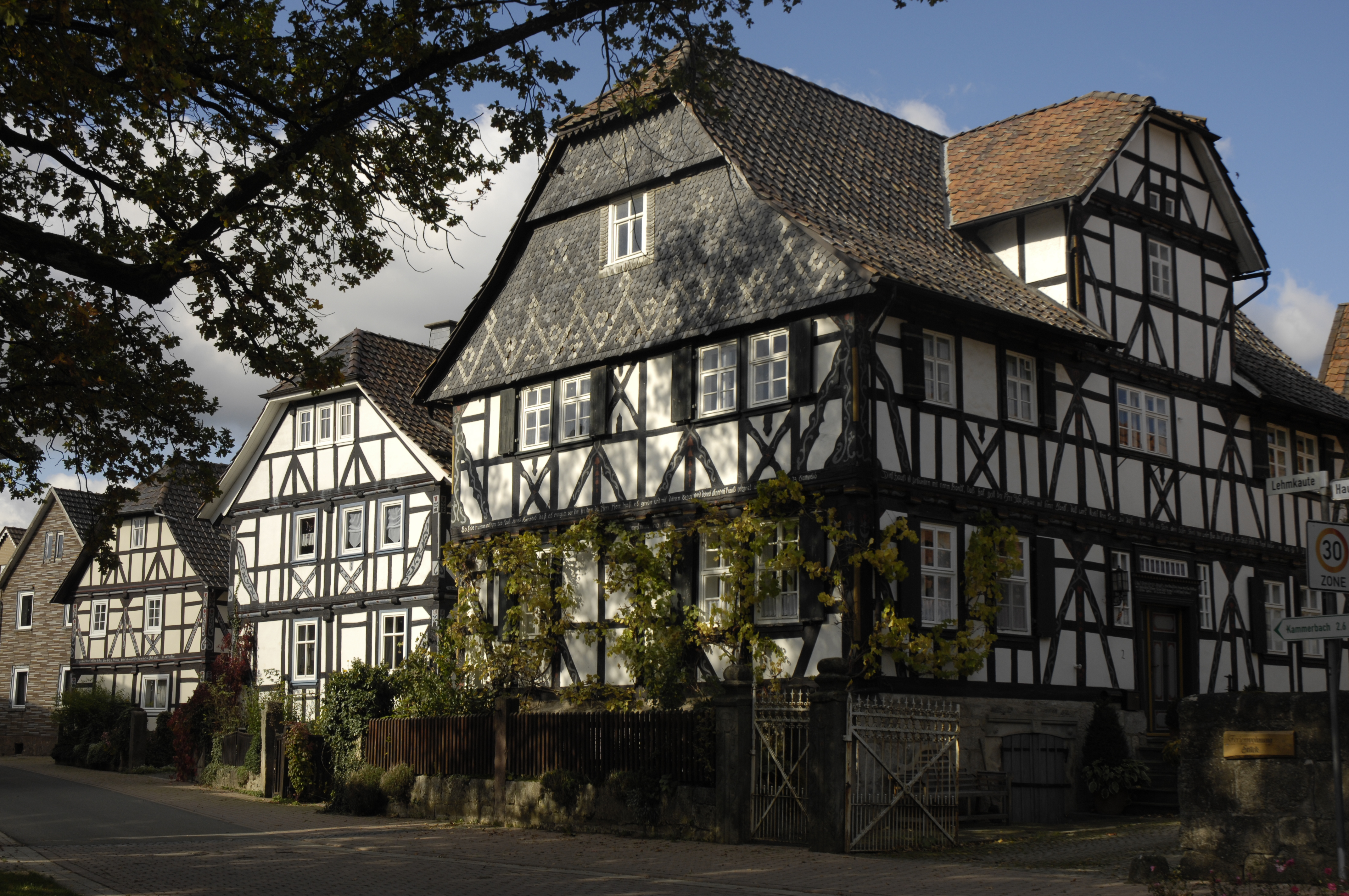 Orferode, Werra-Meißner-Kreis, Fachwerk-Ensemble